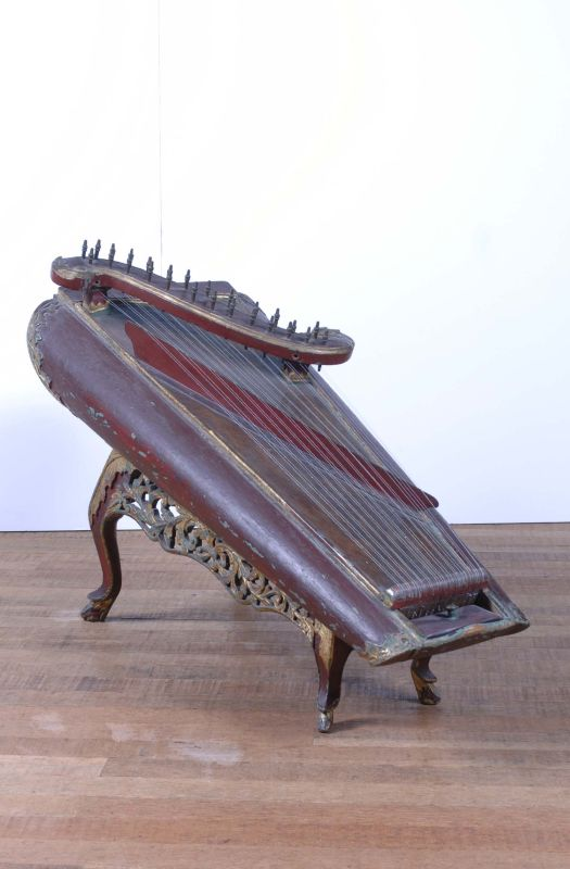 Slaginstrument. Het houtsnijwerk (ukiram) van de onderstellen is gemaakt in de beroemde Djajadipuram volgens aanwijzingen van het toenmalige hoofd. De versieringsmotieven vertonen een melange van 19e eeuwse Biedermeyermotieven (de plantenbak op de gender, de barung en de gambang, het bladermotief) en authentieke Javaanse ornamenten. De gamelan is afkomstig uit de kapatihan van Jogjakarta, waar deze in de tweede helft van de negentiende eeuw werd vervaardigd in opdracht van de regerende patih (eerste minister van het sultanaat Ngajogyaningrat), prins G.P.H. Hadiloesoemo. Deze gamelan werd als losse slendro-gamelan voor het privégebruik van deze patih gebouwd. Er hoort naar alle waarschijnlijkheid geen pelog-helft bij. Er zijn meer gevallen bekend van dergelijke slendro-gamelans uit de Jogja'se kapatihan. De slenthems maakten oorspronkelijk geen deel uit van deze gamelan, evenmin als de onversierde gender barung, die qua klank gewoon een overbodige verdubbeling is van de wél versierde gender barung. . Citer met 26 snaren, onderdeel van gamelan Slendro Unknown language: Celempung